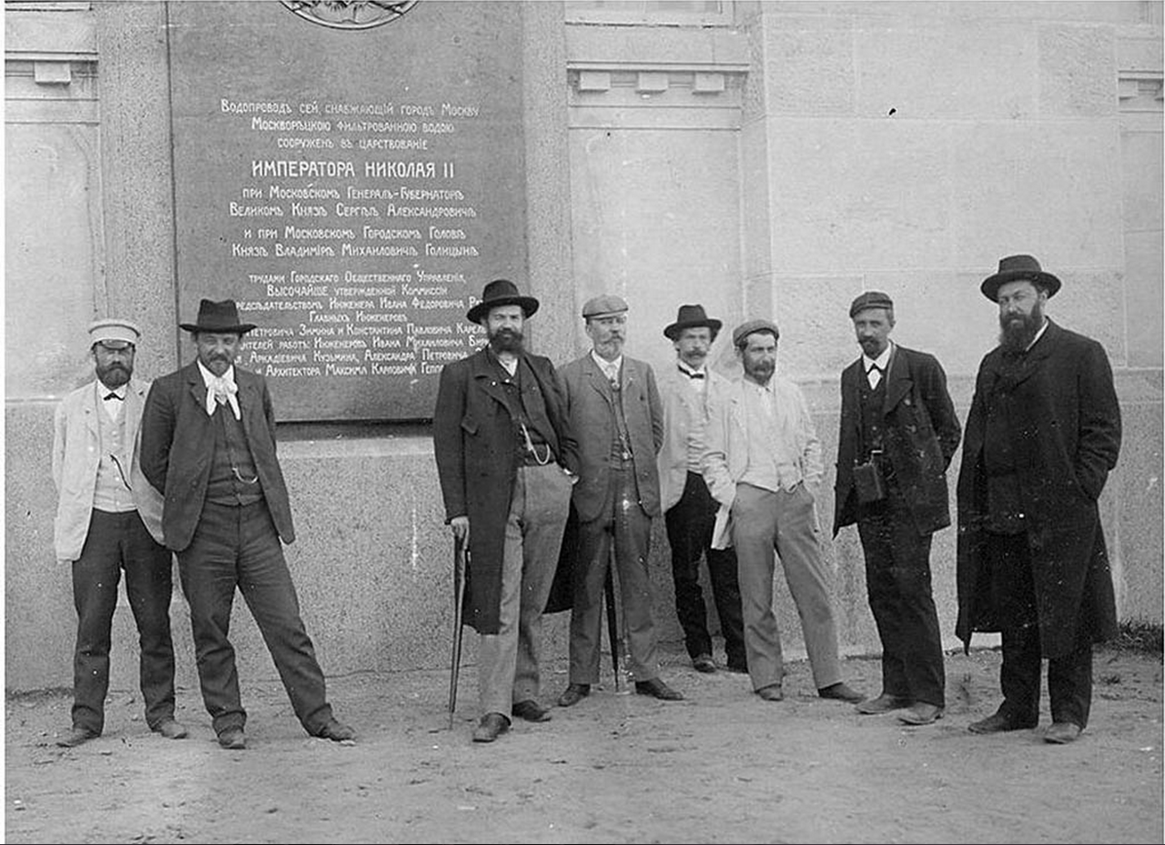 Москва, Воробьёвы горы. Специалисты Москворецкого водопровода у Воробьёвского резервуара. Дореволюционная фотография